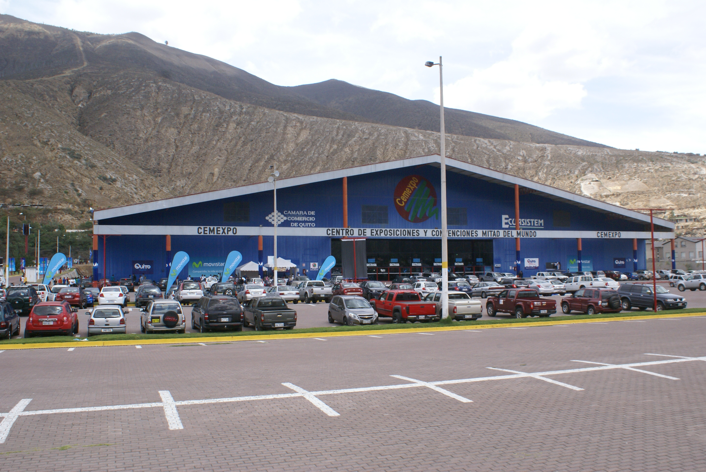 Grupo de Usuarios Wikimedistas de Ecuador